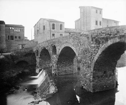 Imatge